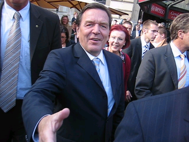 Bundeskanzler Gerhard Schröder in election campaign 2005 at Frankfurt am Main, behind Schröder: Heidemarie Wieczorek-Zeul